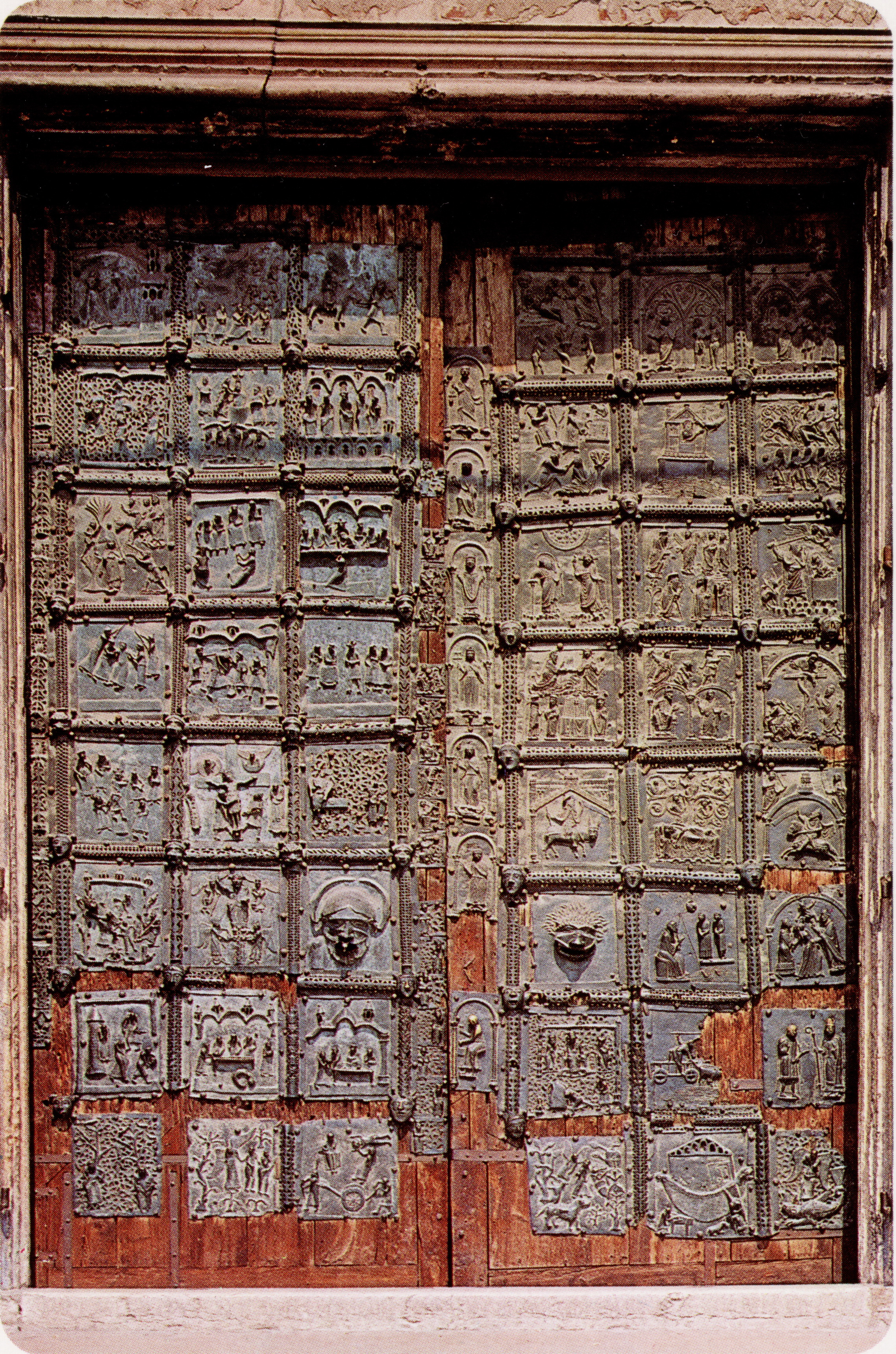 Verona - San Zeno - Portale